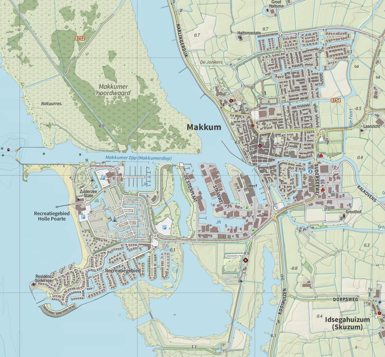 Kaart van Makkum